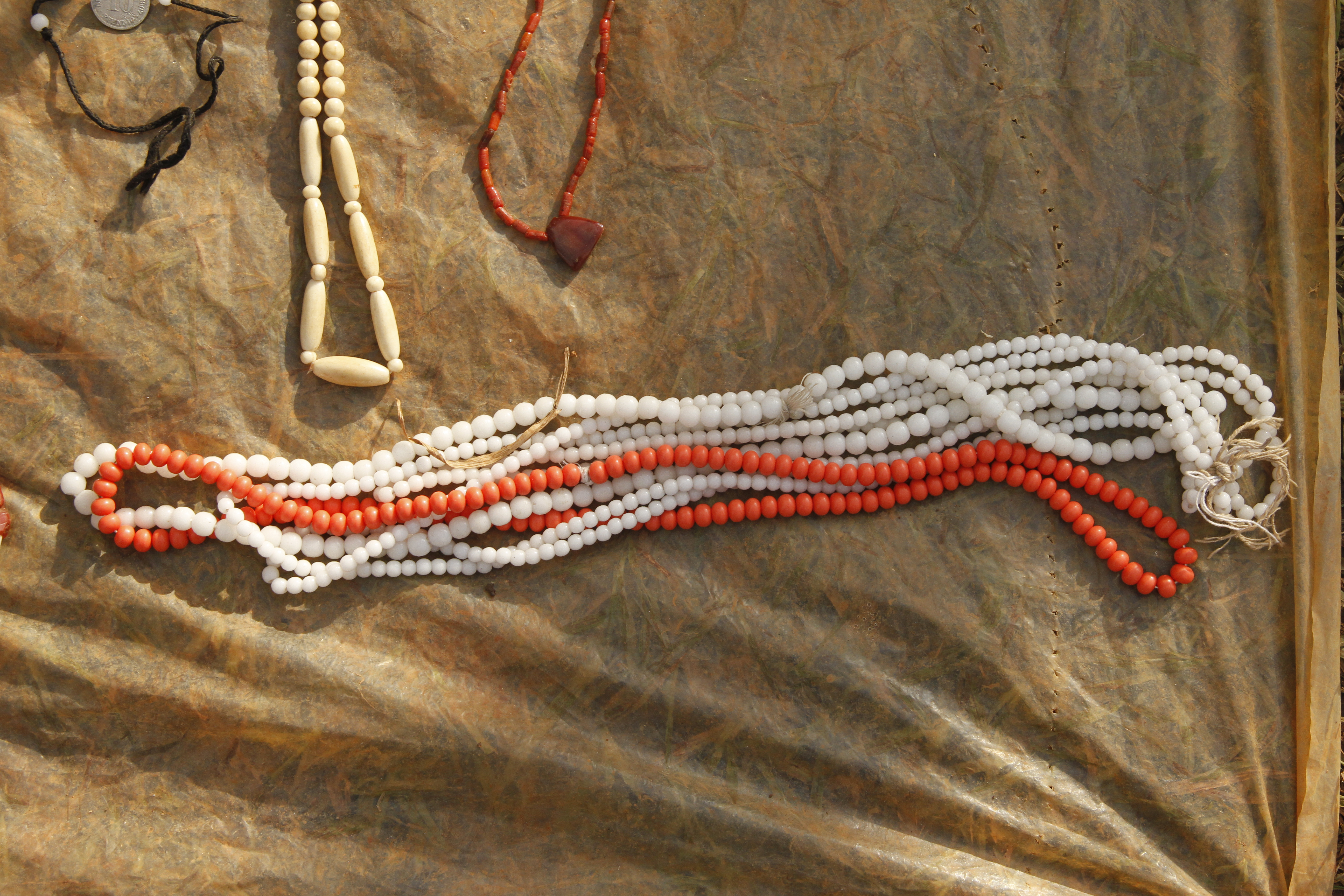 Accessoires de danse du nord du Cameroun sur scène lors du Fenac (Festival National des Arts et la Culture) Yaoundé au Cameroun This is an image from Cameroon